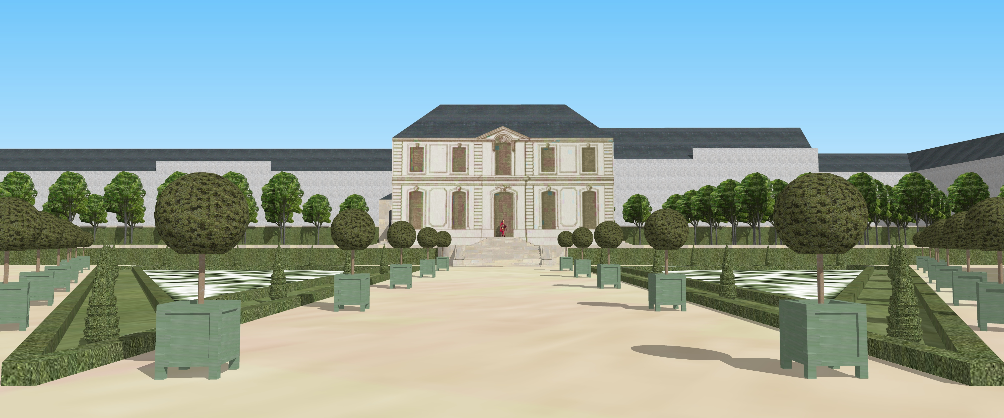 jardins de l'Hôtel Crozat à Paris rue de Richelieu